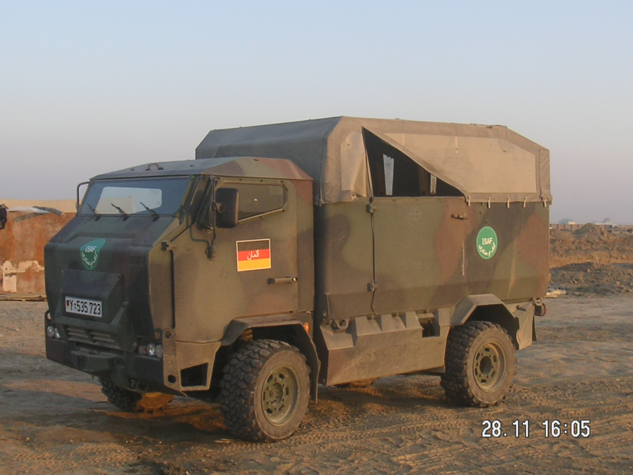 gepanzertes Radfahrzeug Mungo ESK – Einsatzfahrzeug Spezialisierte Kräfte